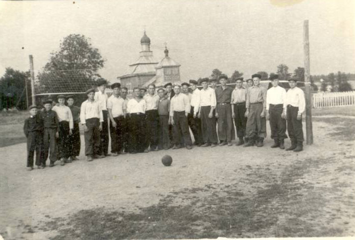 На заднем плане церковь Святого Михаила Архангела.